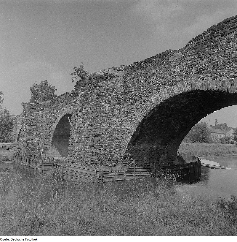 Original image description from the Deutsche Fotothek Freiberg. Altväterbrücke bei Halsbrücke (um 1500)